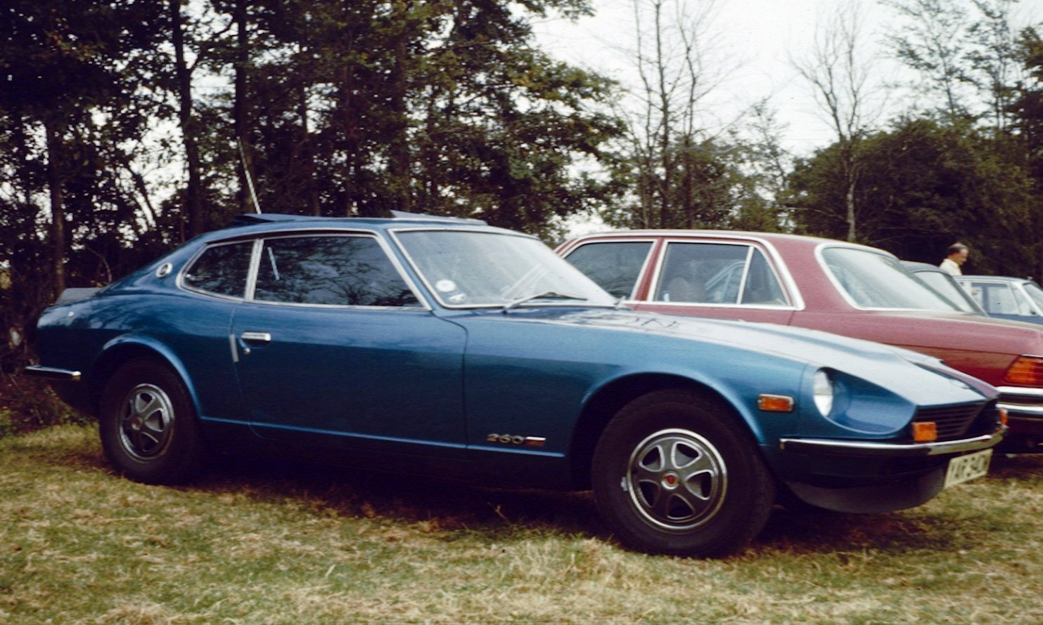 Datsun 260Z +2